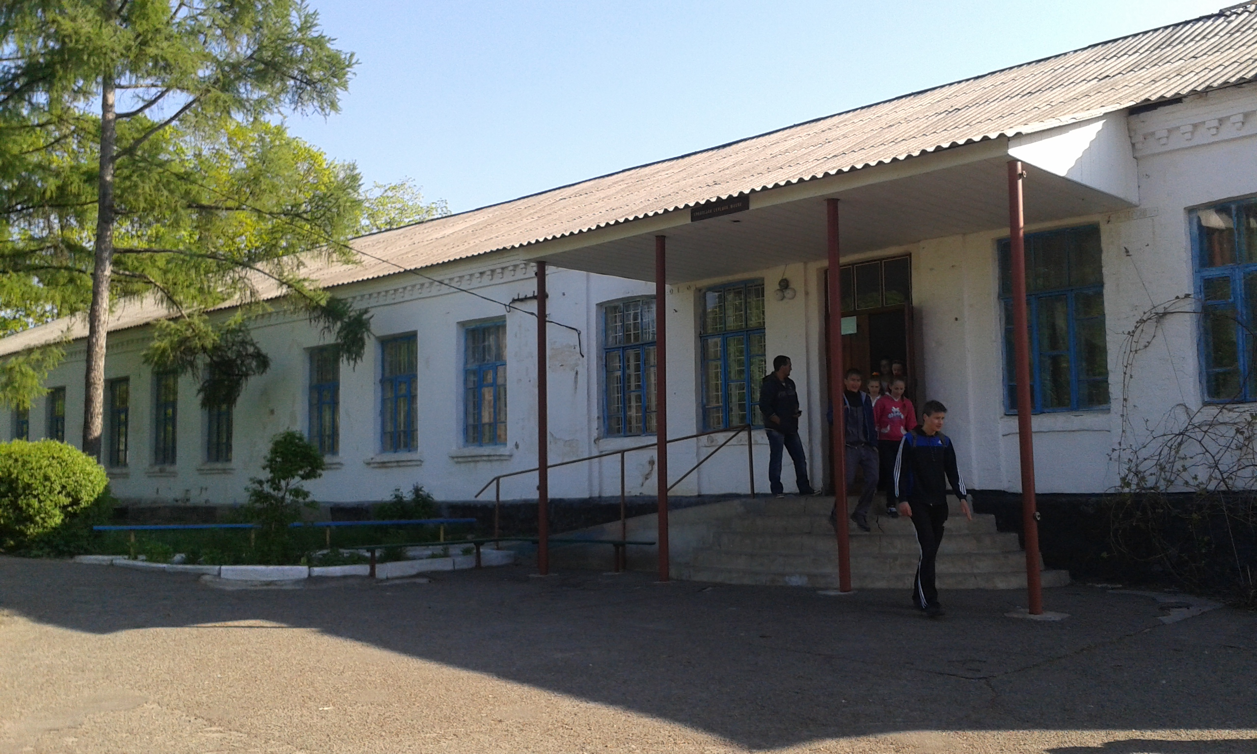 Вид школи з центрального входу